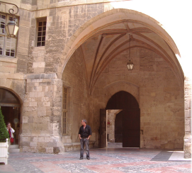 Zona d'acces al Museu Arqueològic de Narbona.